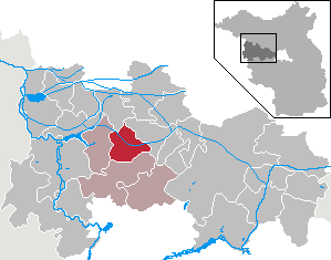 Kotzen in Brandenburg (Country) - District Havelland